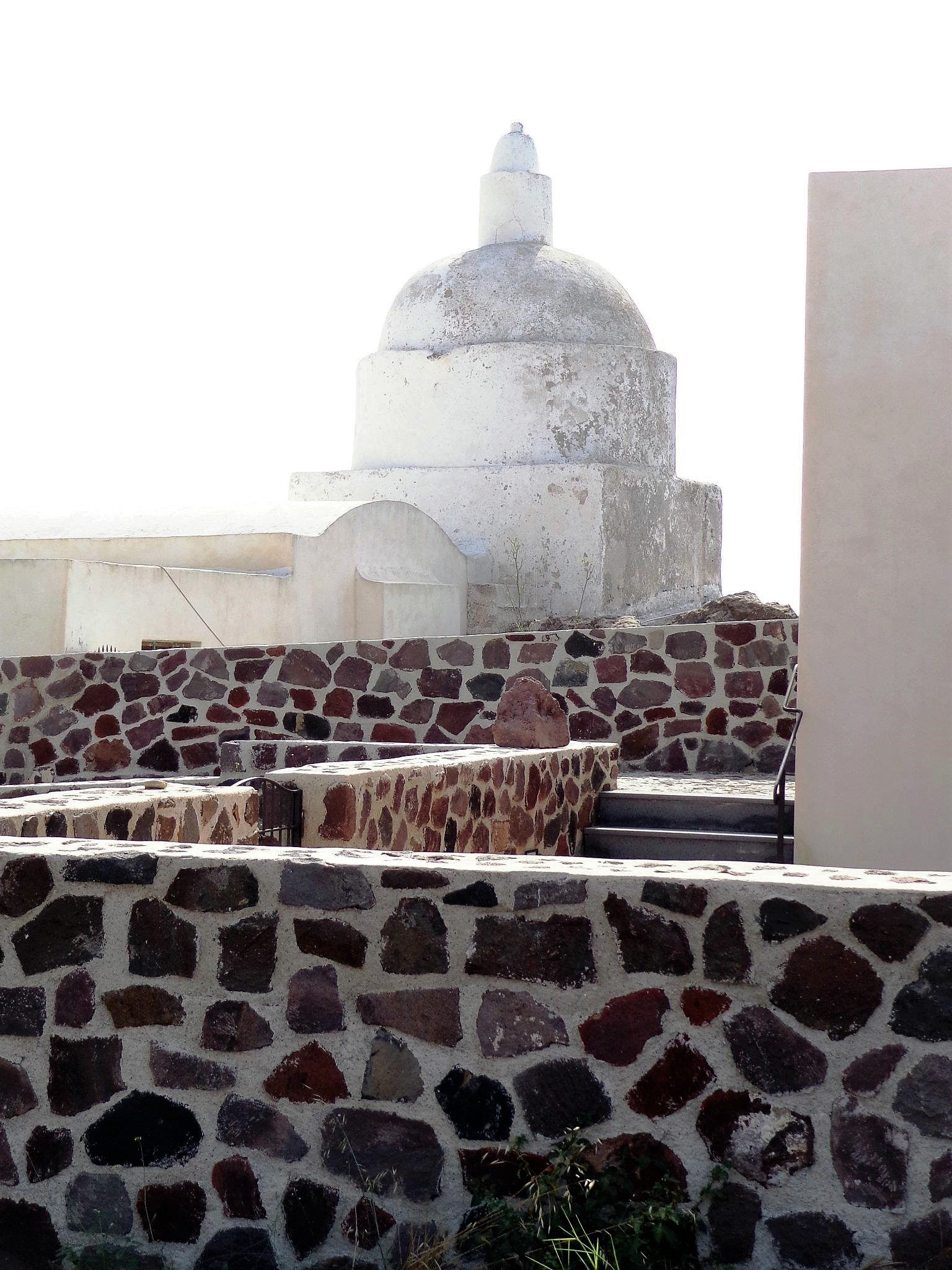 Cupola. Foto presente su pagine web personali e sul profilo FB.